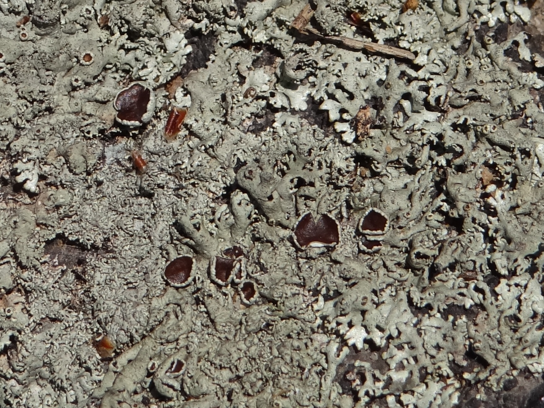 Xanthoparmelia somloënsis (location:Poland, Rajbrot, Kamienie Brodzińskiego)